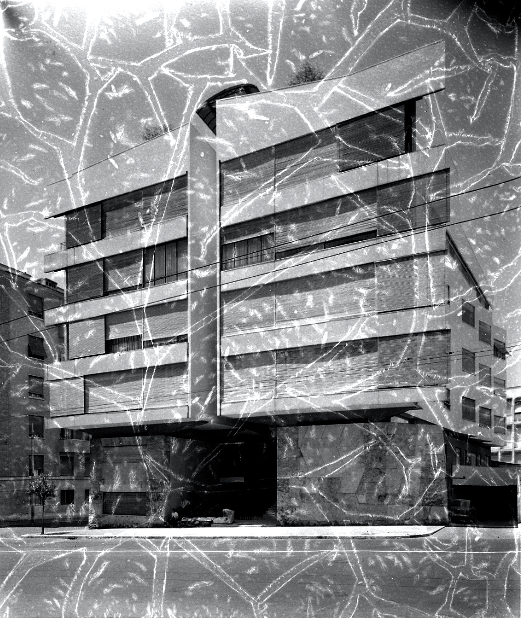 Servizio fotografico : Roma, 1951 / Paolo Monti. - Buste: 10, Fototipi: 10 : Negativo b/n, gelatina bromuro d'argento/ pellicola ; 10x12. - ((Serie costituita da 10 buste di negativi identificati con i nn.: 2869, 2870, 2871, 2872, 2873, 2874, 2875, 2876, 2877, 2878, e tenute insieme da una graffetta. - Le buste sono numerate da 47 a 56. - I negativi presentano segni di degrado (gelatina raggrinzita, bolle e alterazione tonale). - Fonte: Rubrica di Paolo Monti: Archivio 10x12 (ultimi numerati) - dal G1 al (s.d.), presso Archivio Paolo Monti